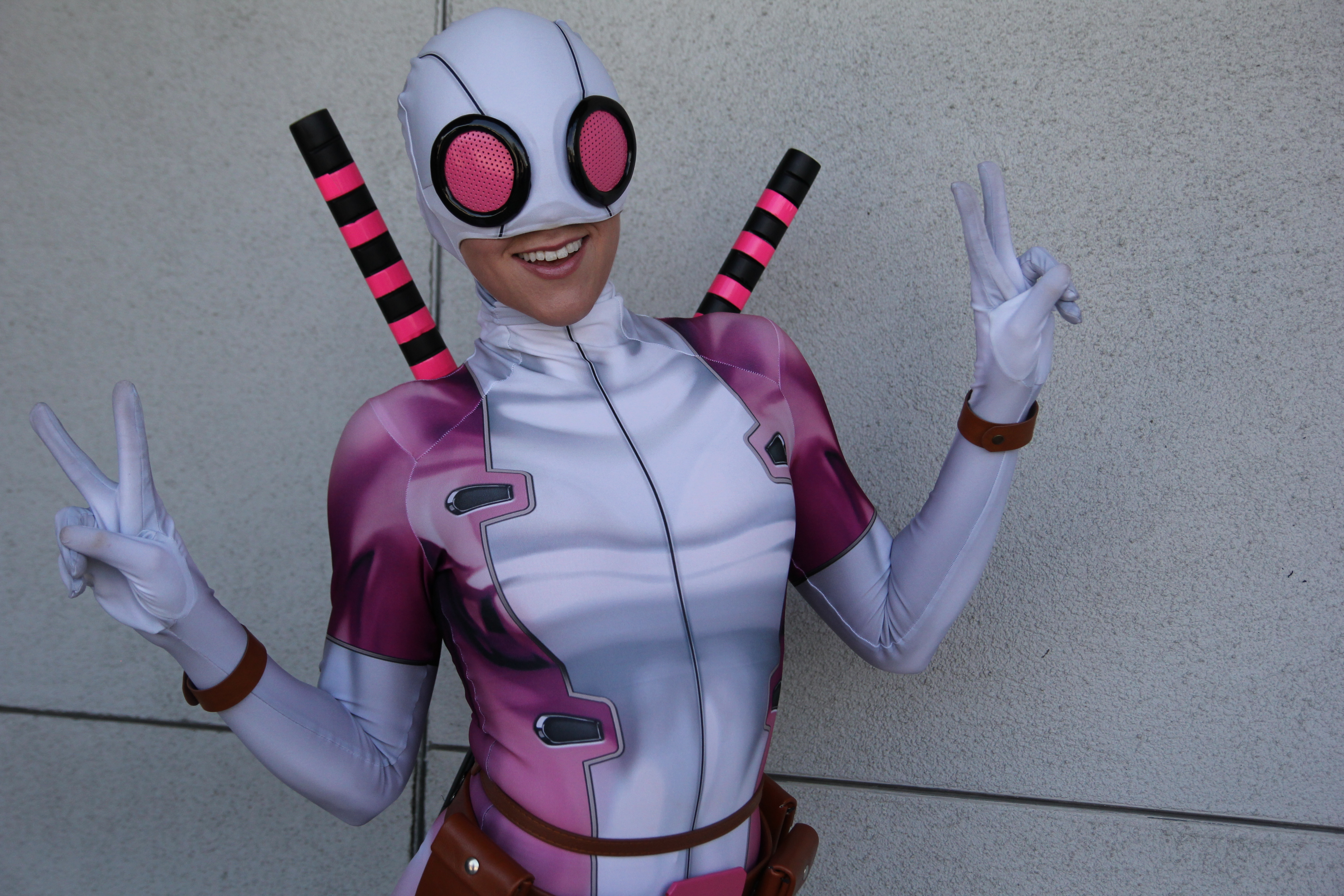 WonderCon 2019 - Gwenpool cosplay